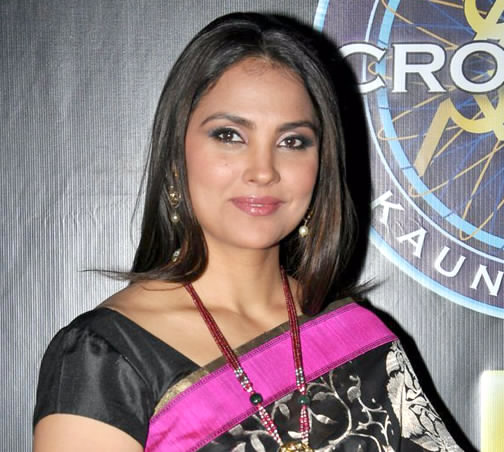 Lara Dutta graces KBC special children's episode